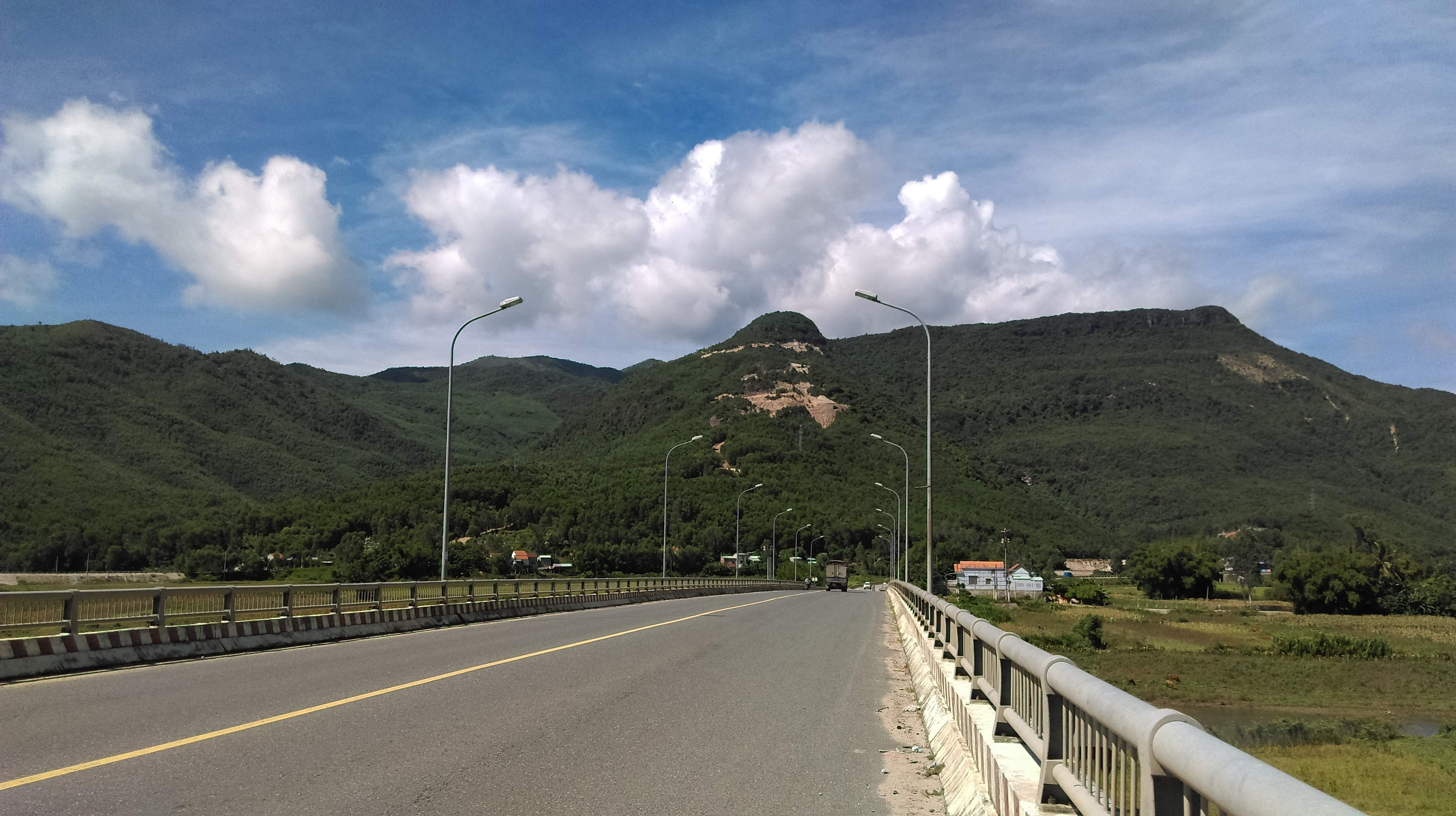 Cầu Hà Nha, Đại Lộc, Quảng Nam